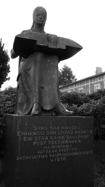 Cette statue située dans la vieille ville honore le passé des fileuses de soie, qui ont fait la renommée de Rauma